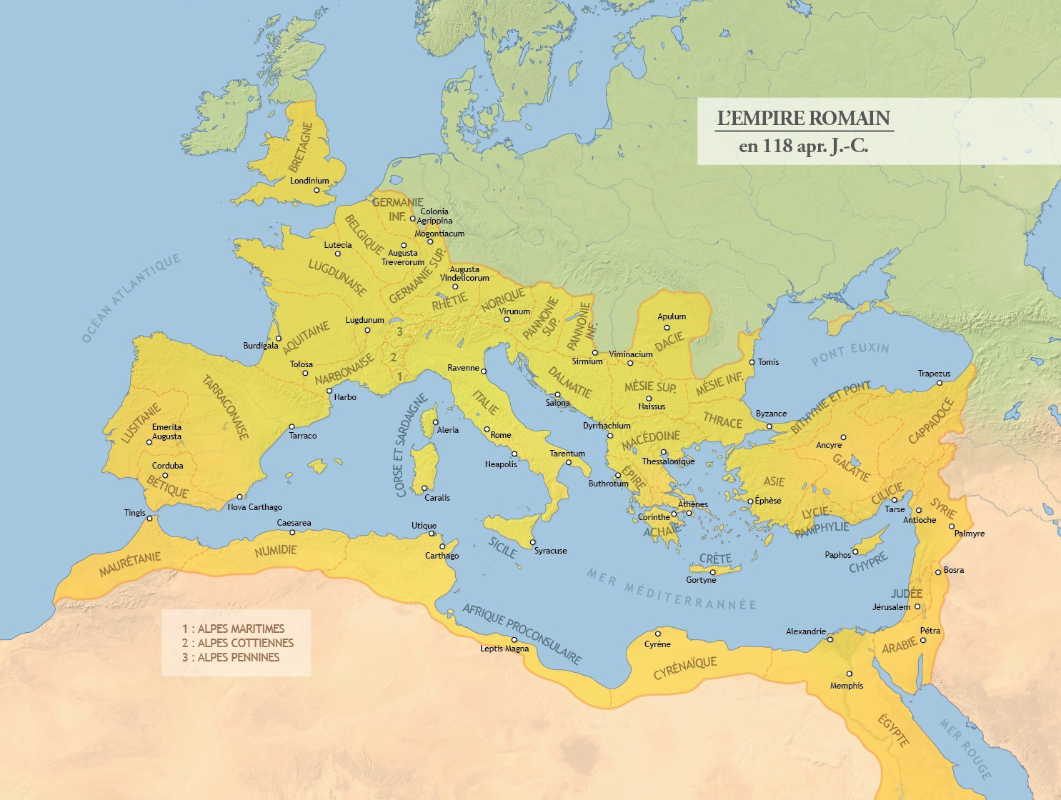 Carte de l'Empire romain en 118 après J.-C. avec découpage des provinces et principales villes